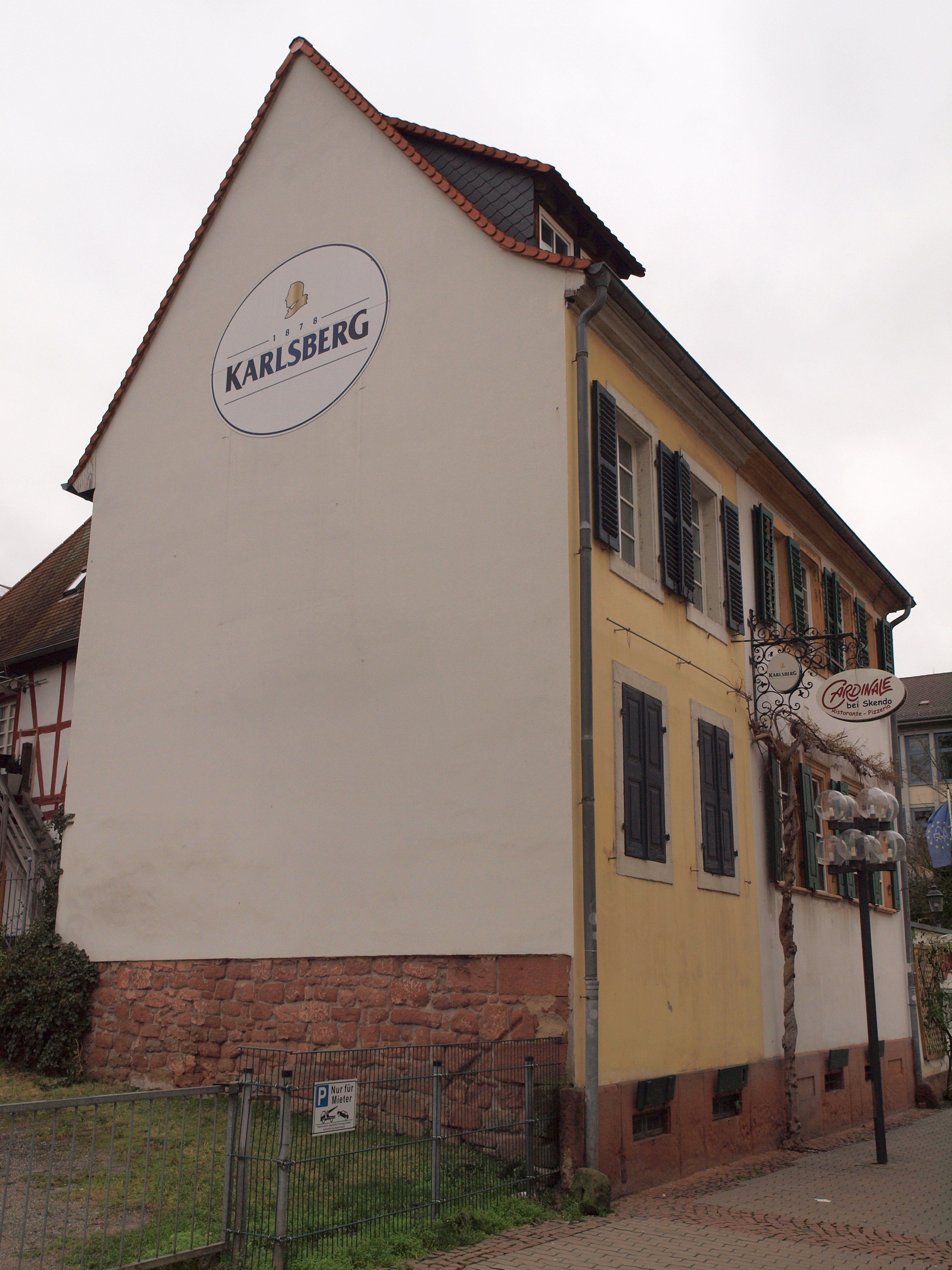 Rittersberg 14 Kaiserslautern, Ansicht von Südost